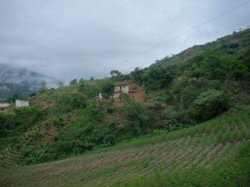 Bolivia